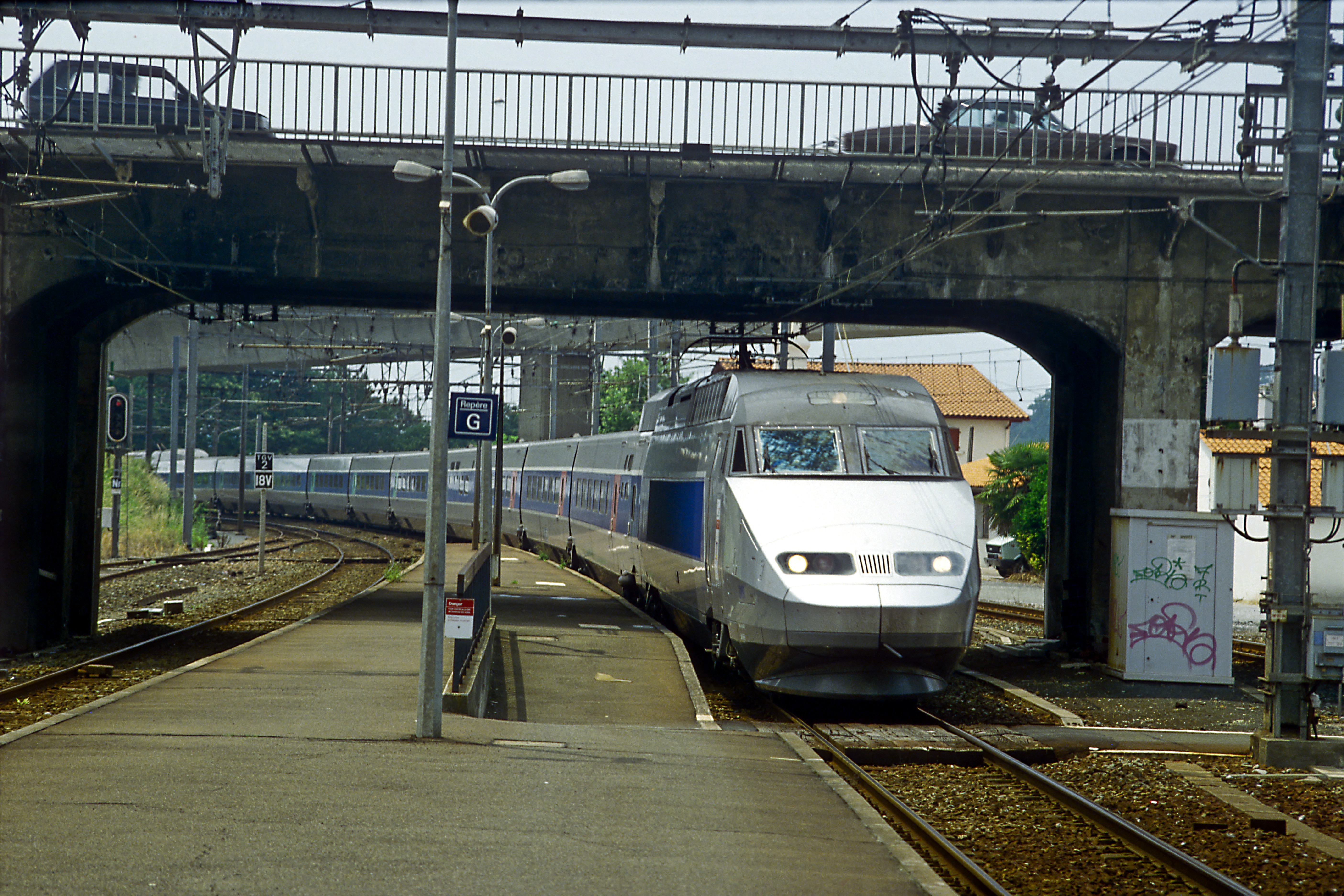 TGV Hendaye–Paris bei der Einfahrt. Bis Pau halten die Hochgeschwindigkeitstriebzüge relativ oft, um die Reisenden Richtung Paris aufzusammeln. Ab Bordeaux verkehrt der Zug dann ohne weiteren Verkehrshalt.